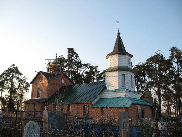 Астрашыцкі Гарадок. Перабудова царквы